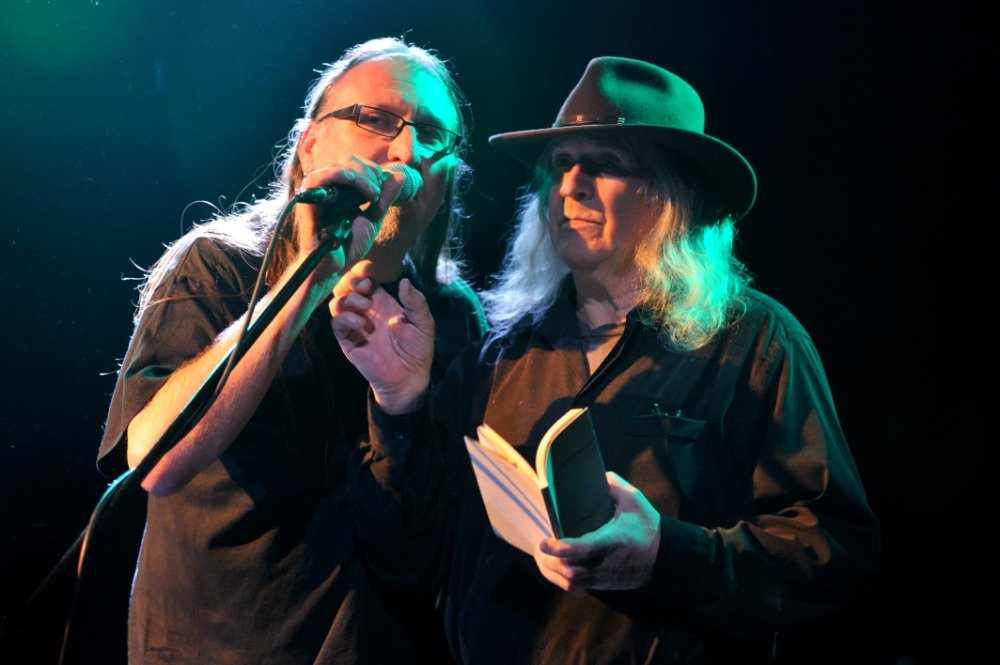 Ivan Martin Jirous zv. Magor a Vladimír Drápal